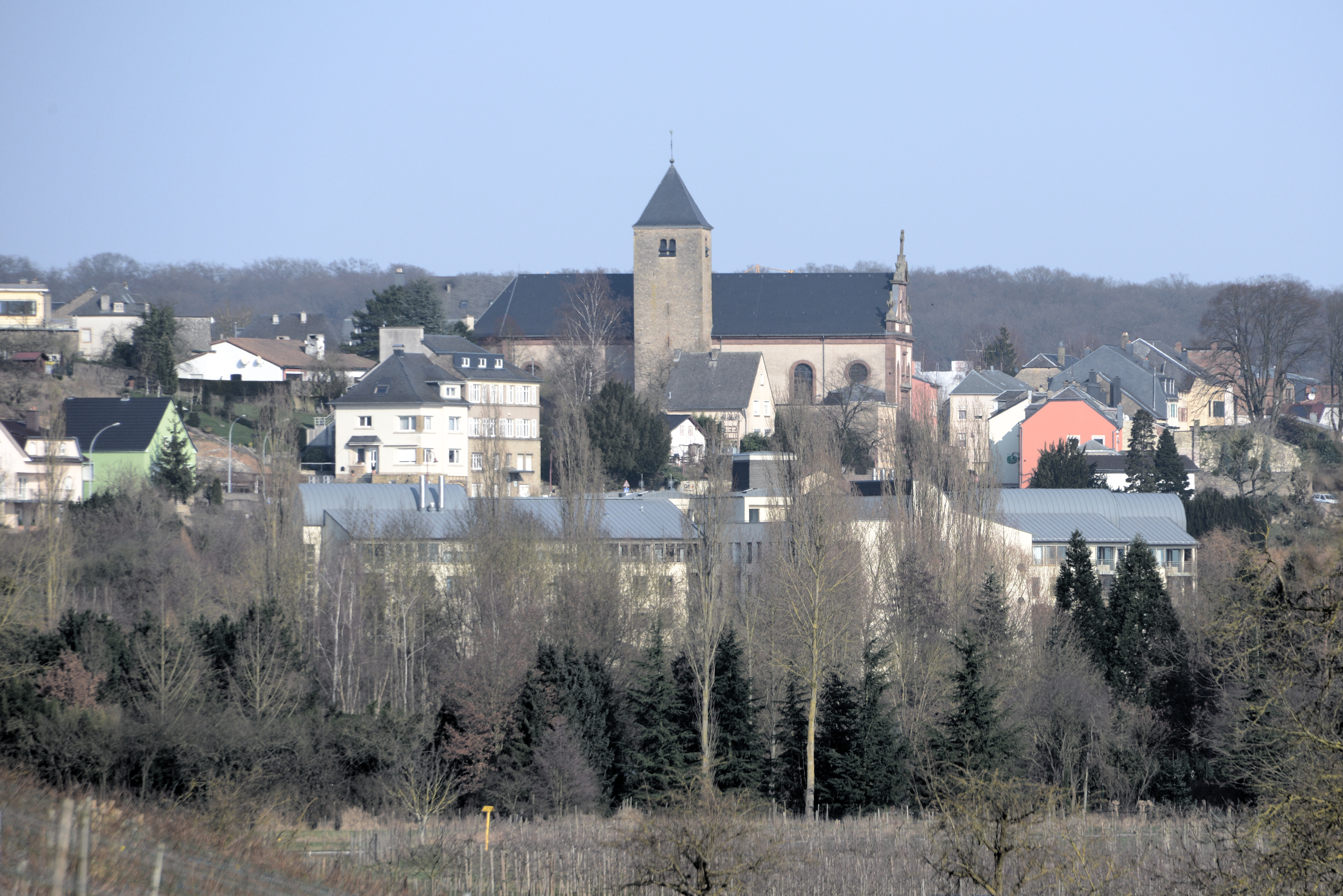 Réimech vu Bech-Maacher gesinn.